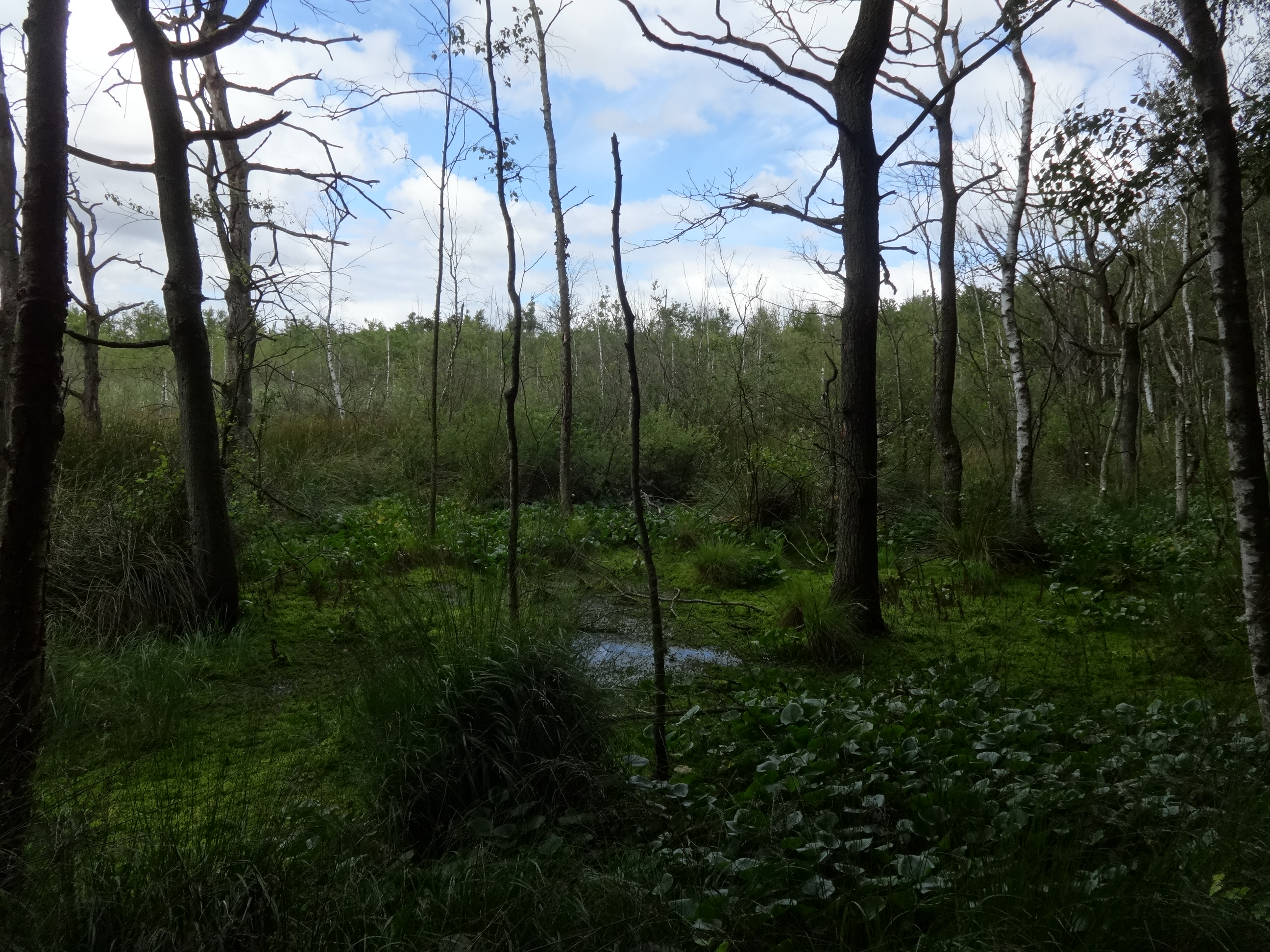 Jeeser Moor, ein Sauer-Zwischenmoor in Jeeser, einem Ortsteil der Gemeinde Sundhagen in Mecklenburg-Vorpommern